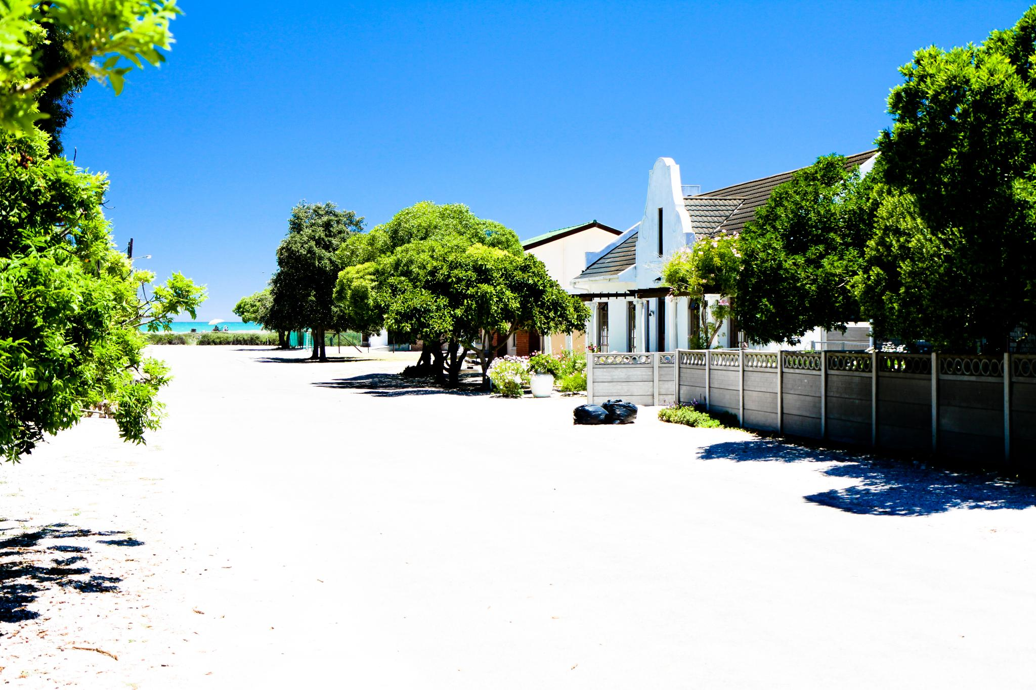 Beach house in Dwarskersbos